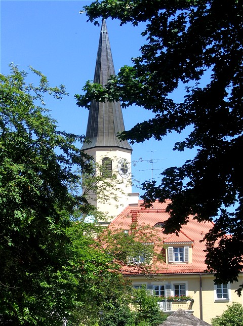 St. Sylvester, Muenchen-Schwabing